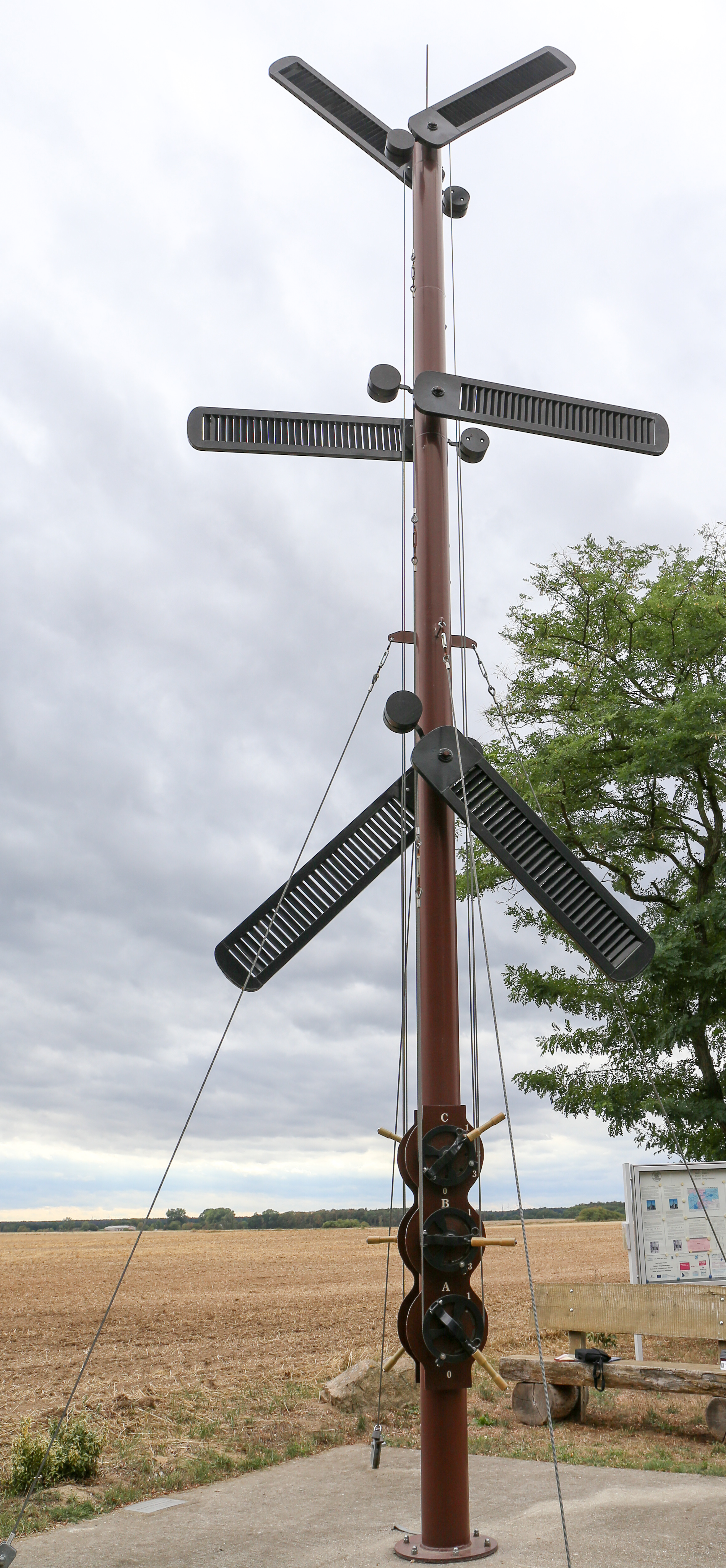 Ziegelsdorf ist ein Ortsteil von Möckern im Landkreis Jerichower Land in Sachsen-Anhalt.